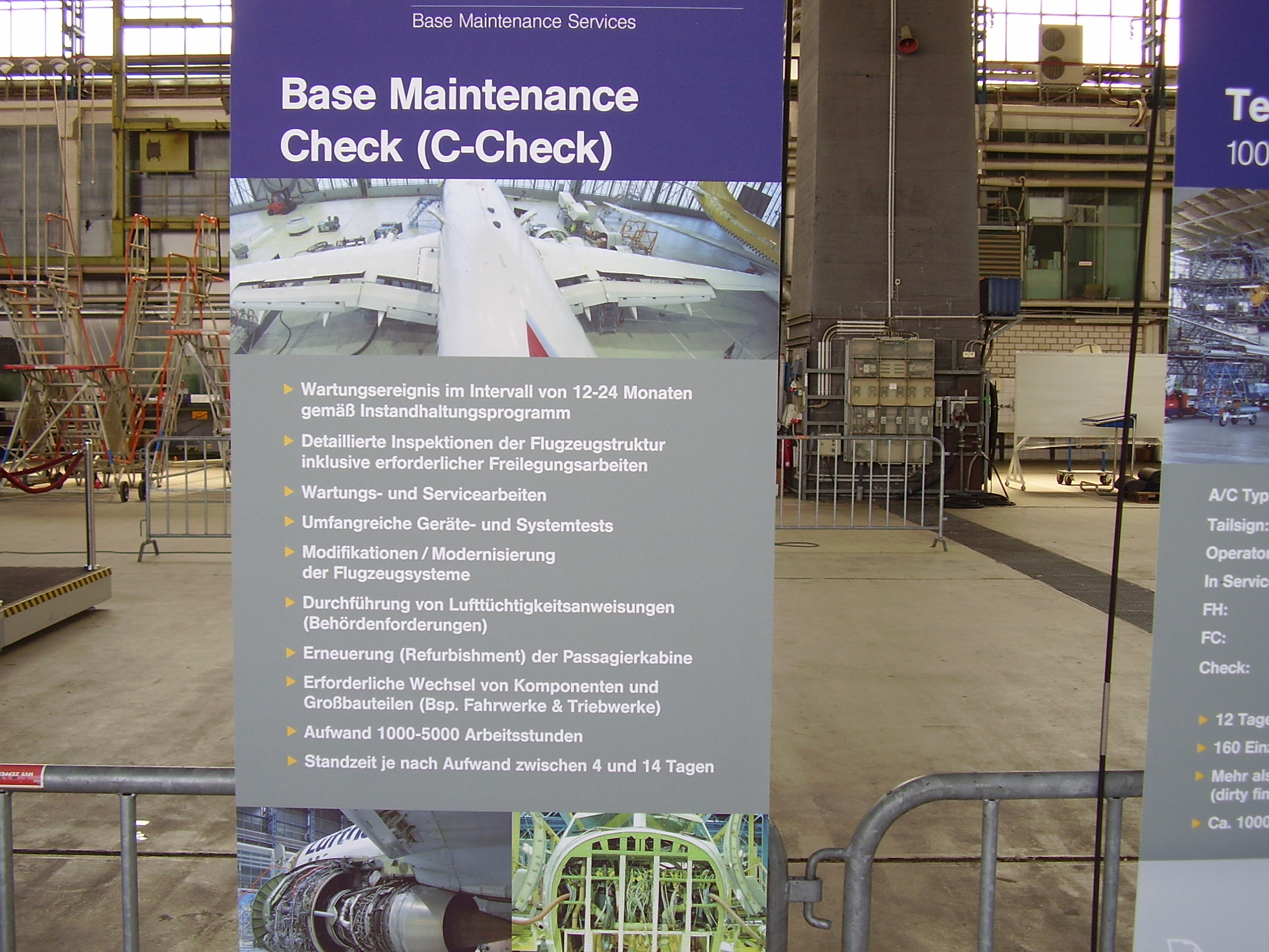 ILA 2008